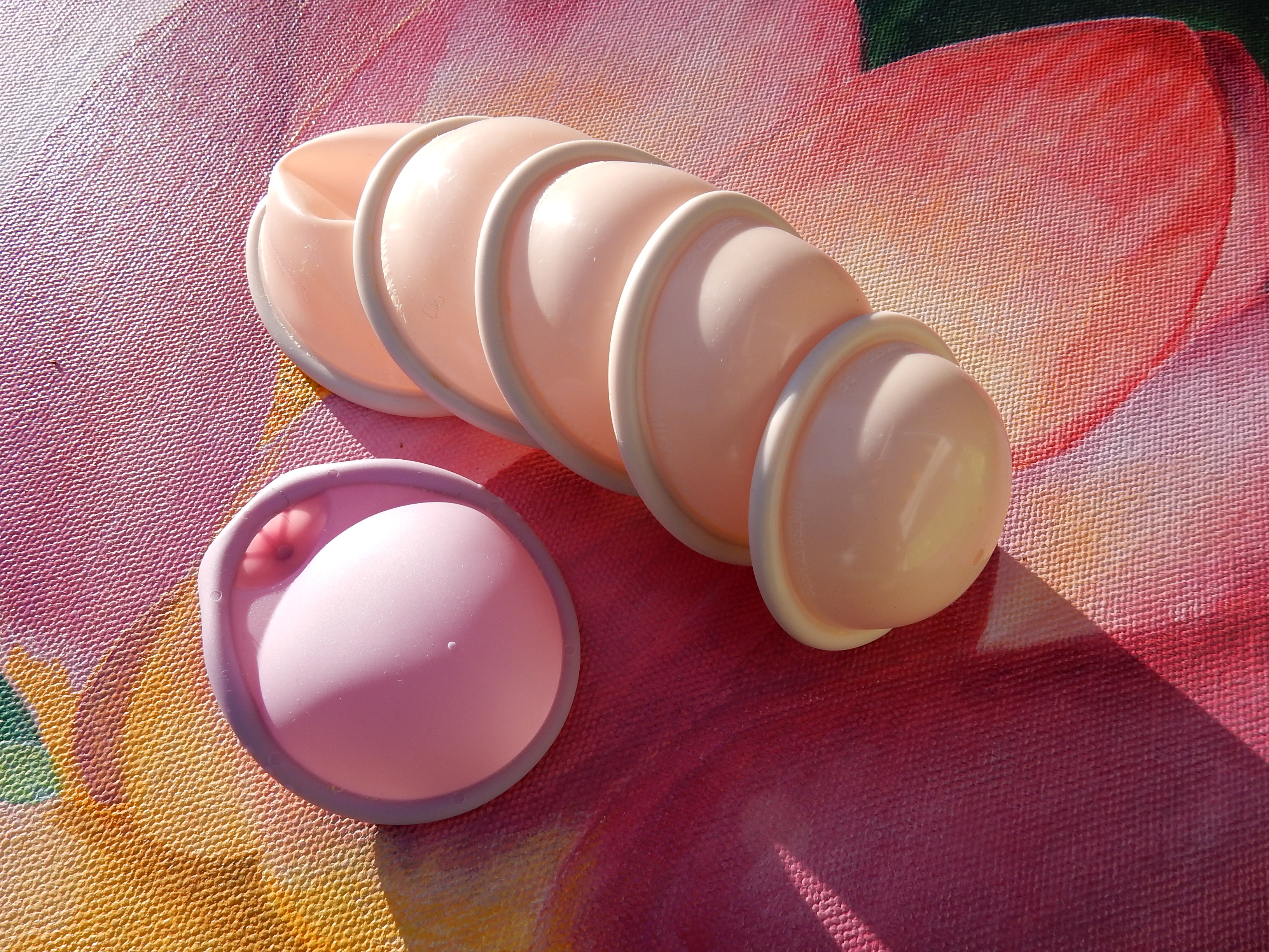 Einheits- und Mehrgrößen-Diaphragmen aus Silikon